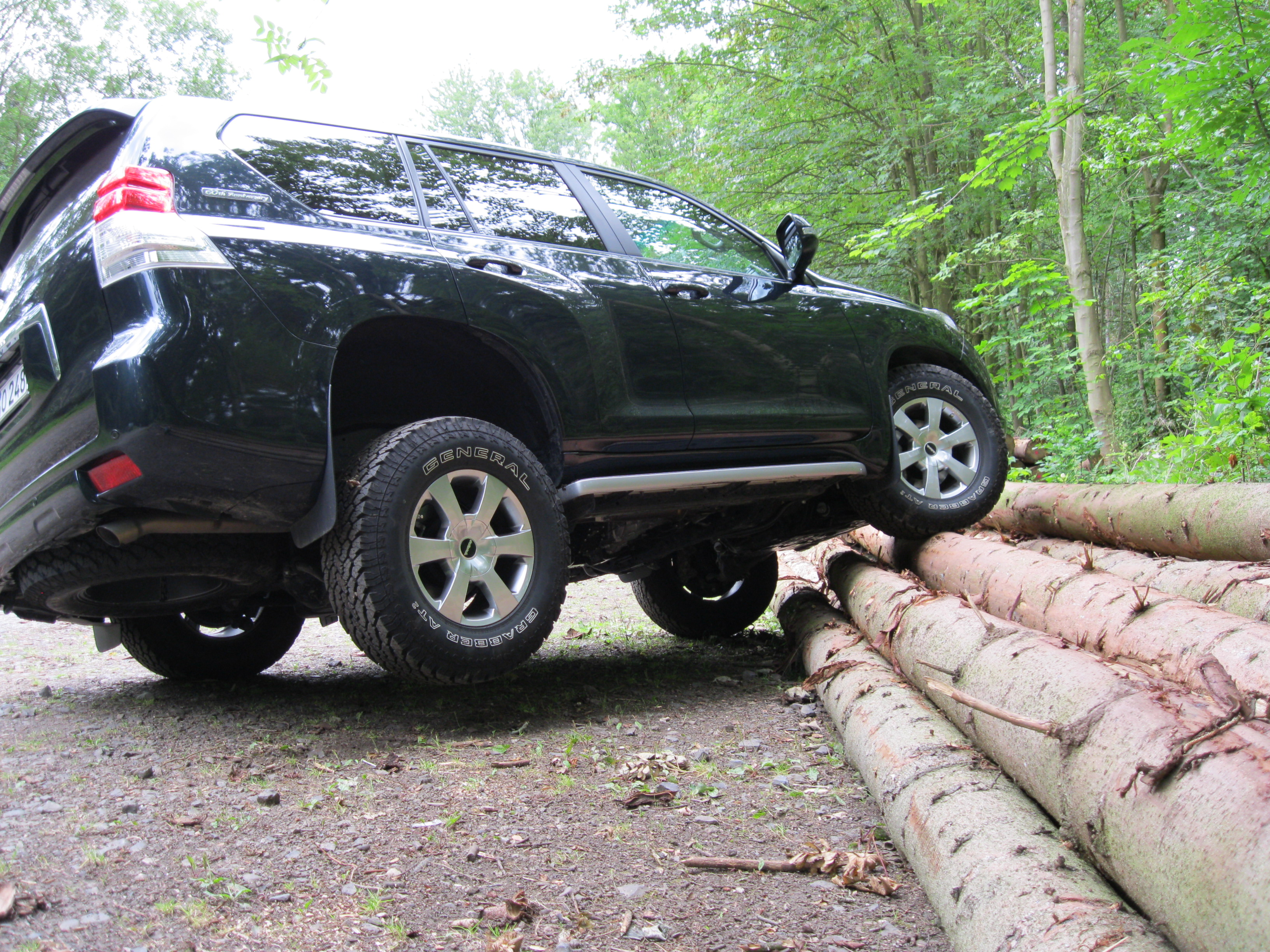 Geländefahrzeug Toyota Landcruiser J15 mit 230mm Achsverschränkung